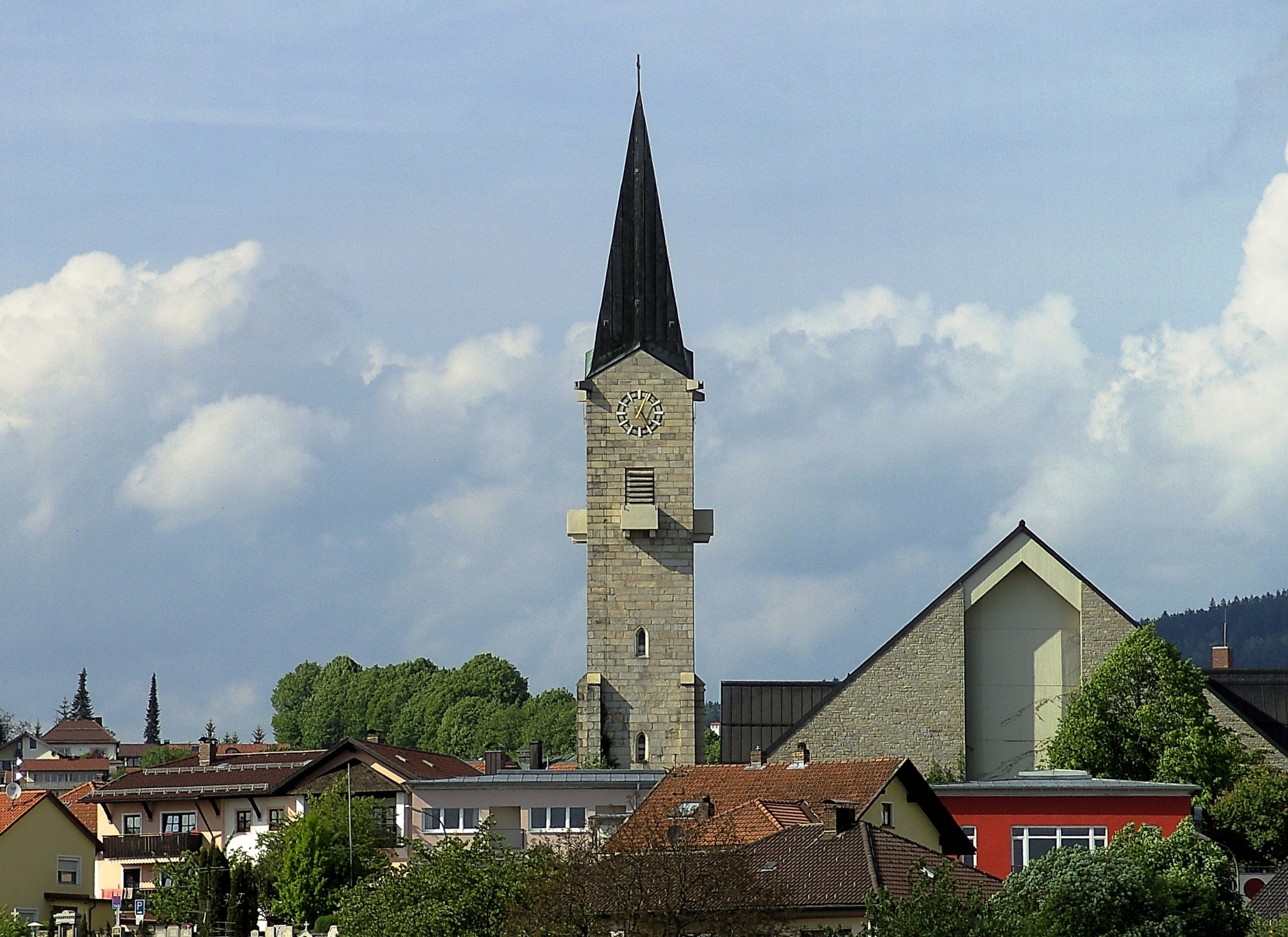 Die Stadt Hauzenberg von Süden aus gesehen.